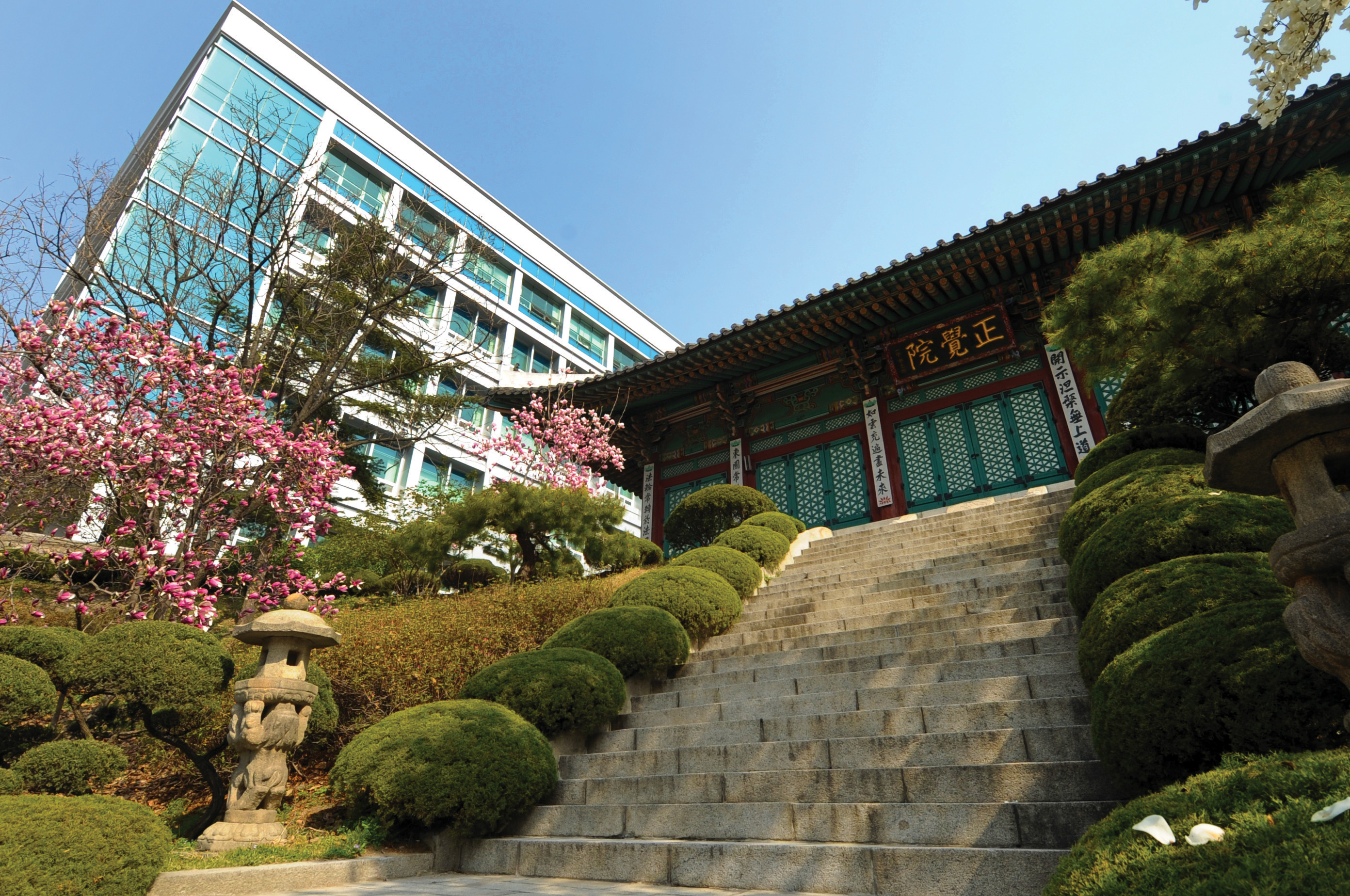 DONGGUK UNIVERSITY Jeonggakwon(korean buddhist)